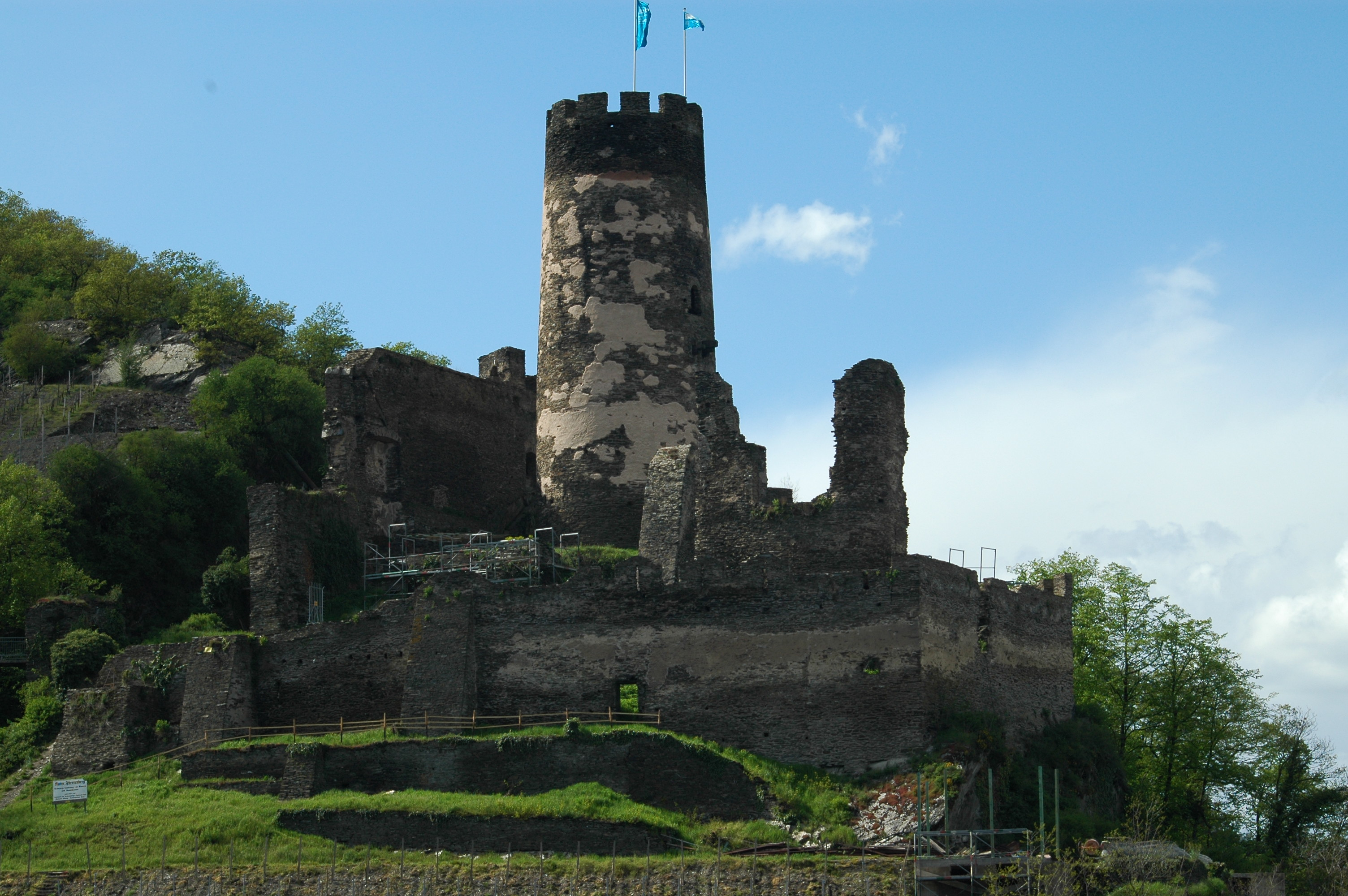 Fürstenberg von Süden